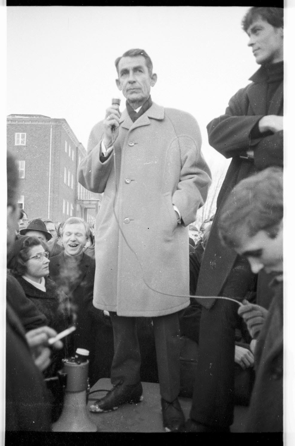 Kundgebung am Kultusministerium, Kiellinie, Reventlou. Ca. 3000 nehmen teil. Es spricht Kultusminister Claus Joachim von Heydebreck. Rechts AStA-Referent Jürgen Graalfs, Liberaler Studentenbund Deutschlands (LSD).